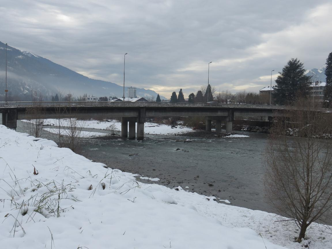 Rivière Arly à Alberville